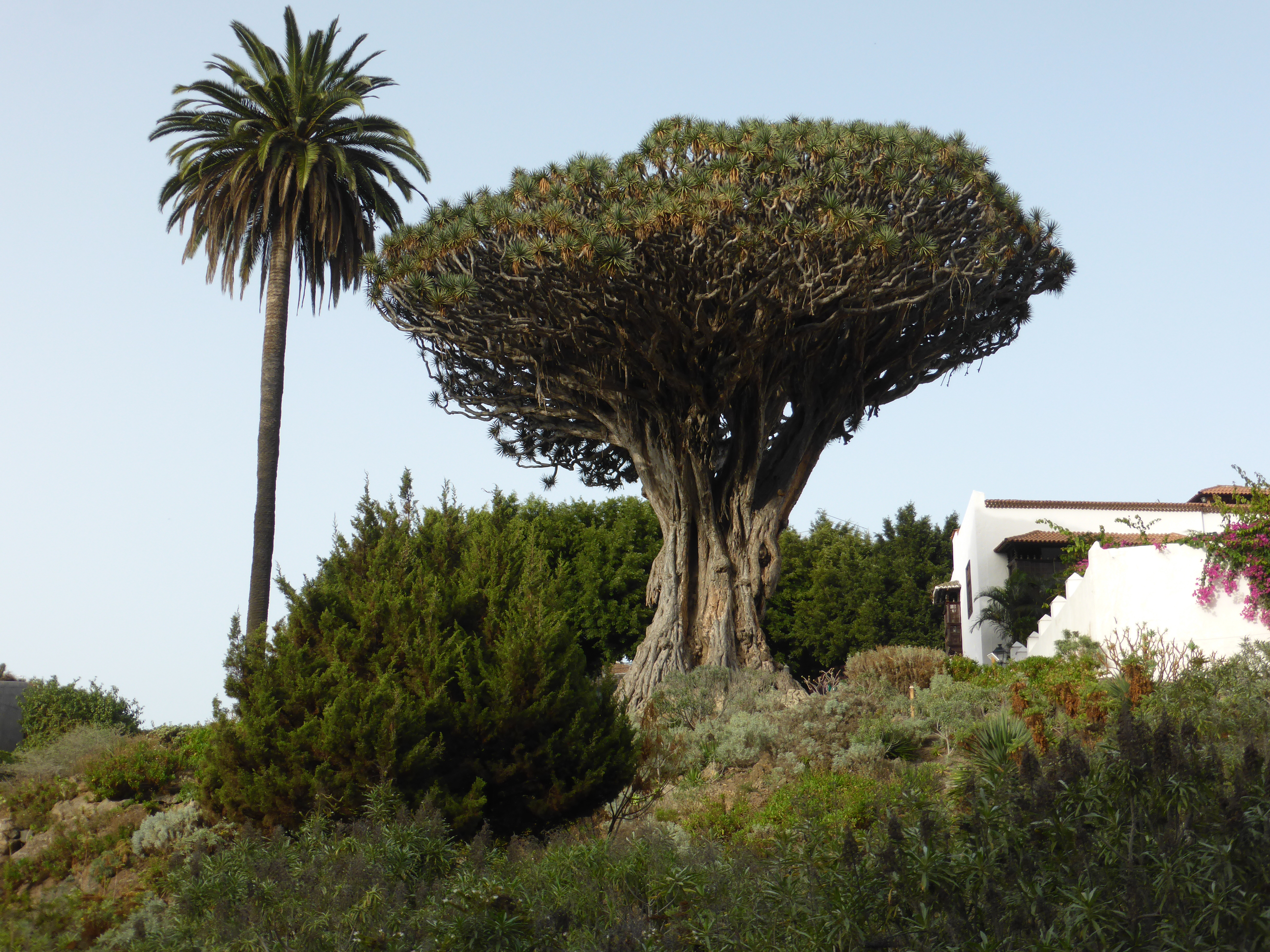 El Drago de Icod de los Vinos se estima que puede tener cerca de 1000 años. Actualmente es el drago más grande y antiguo de los existentes. Anteriormente, hasta el siglo XIX, en La Orotava existió otro drago todavía mayor, que derribó un huracán en 1867. Isla de Tenerife.